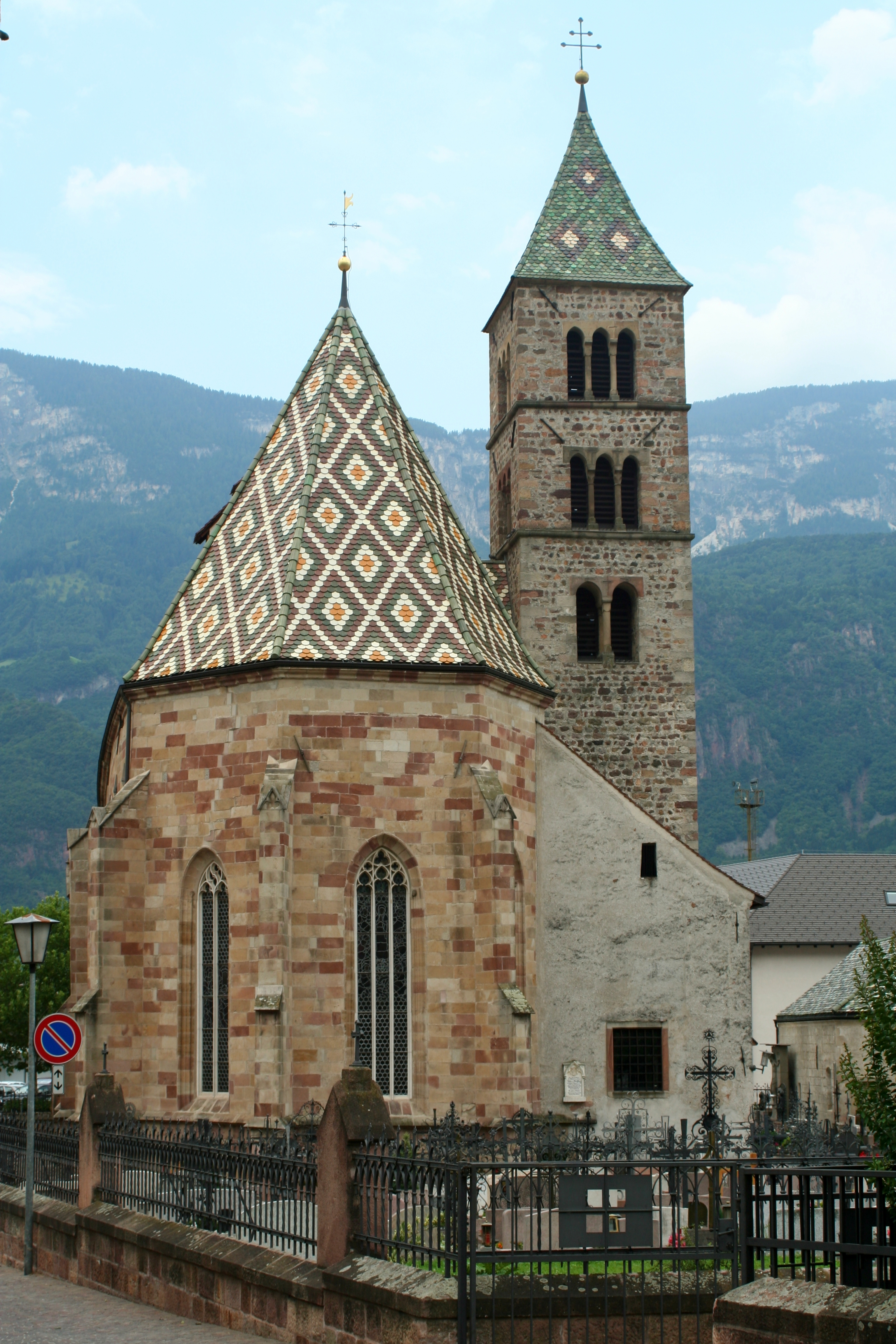 Pfarrkirche Maria Himmelfahrt mit Turm, Friedhofskapelle und Friedhof